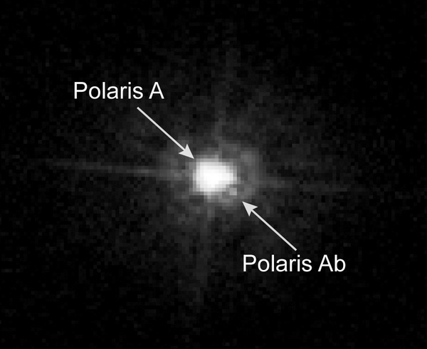 哈勃望遠鏡拍攝的北極星及其伴星特寫（經剪裁，只要右下帶說明圖）